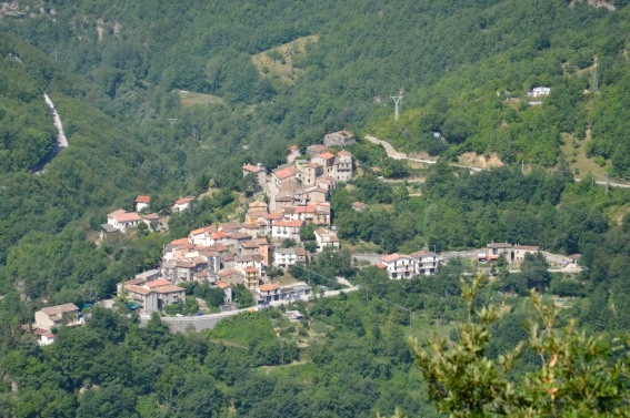 Senarica, frazione di Crognaleto vista dall'alto